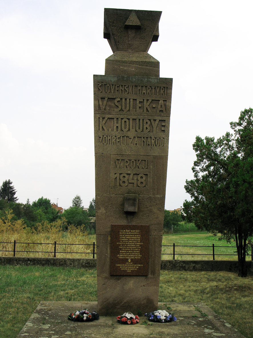 V obci Šulekovo na mieste vykonania popravy, bol postavený v roku 1927 Pamätník Viliamovi Šulekovi a Karolovi Holubymu